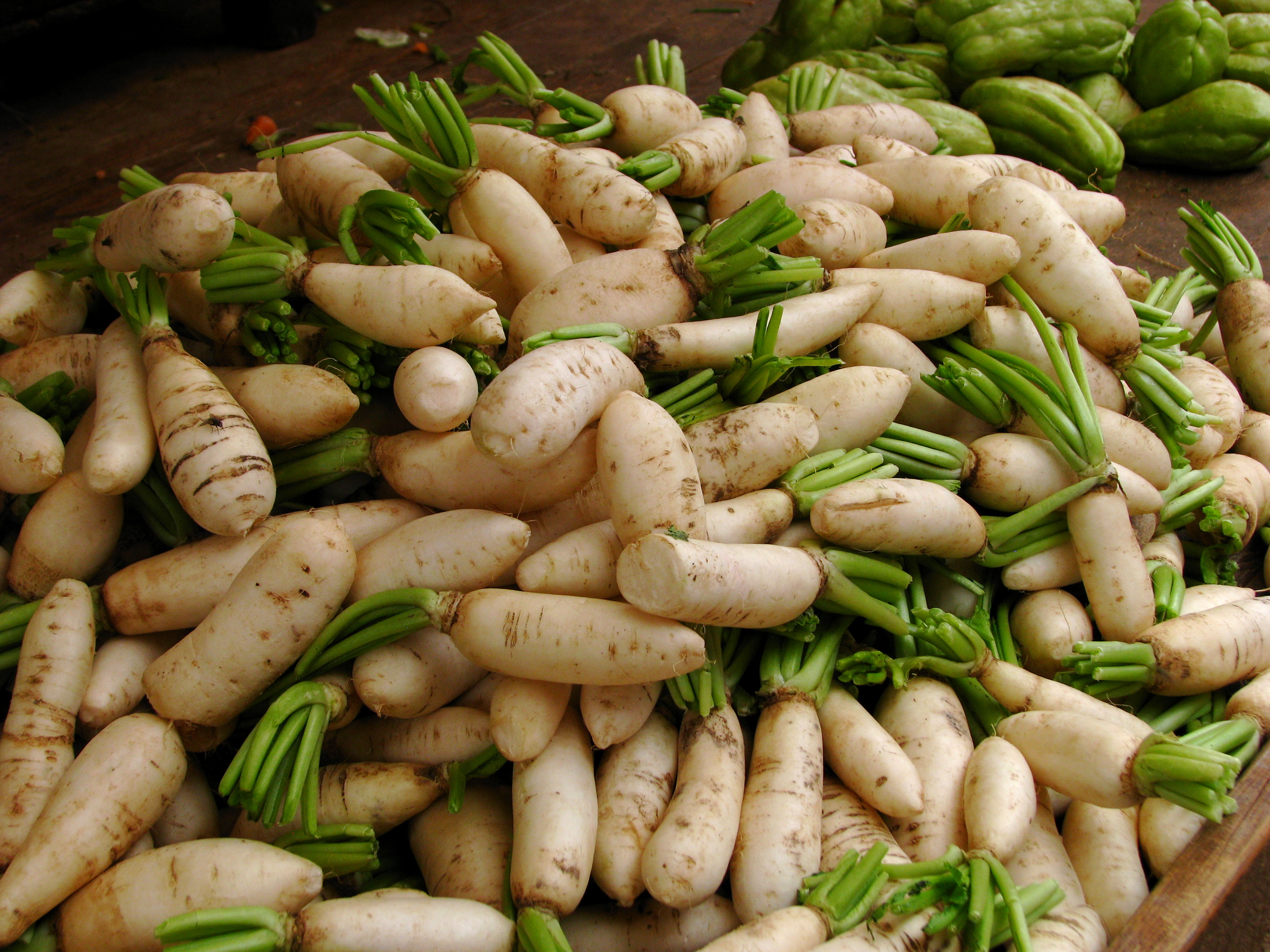 India - Koyambedu Market - Radishes 01